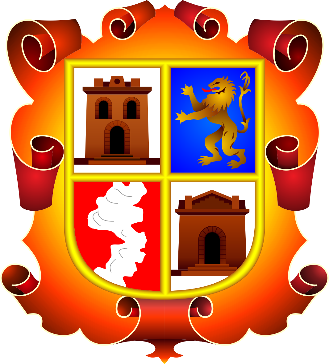 Distrito de Andahuaylas - Provincia de Andahuaylas - Región Apurímac